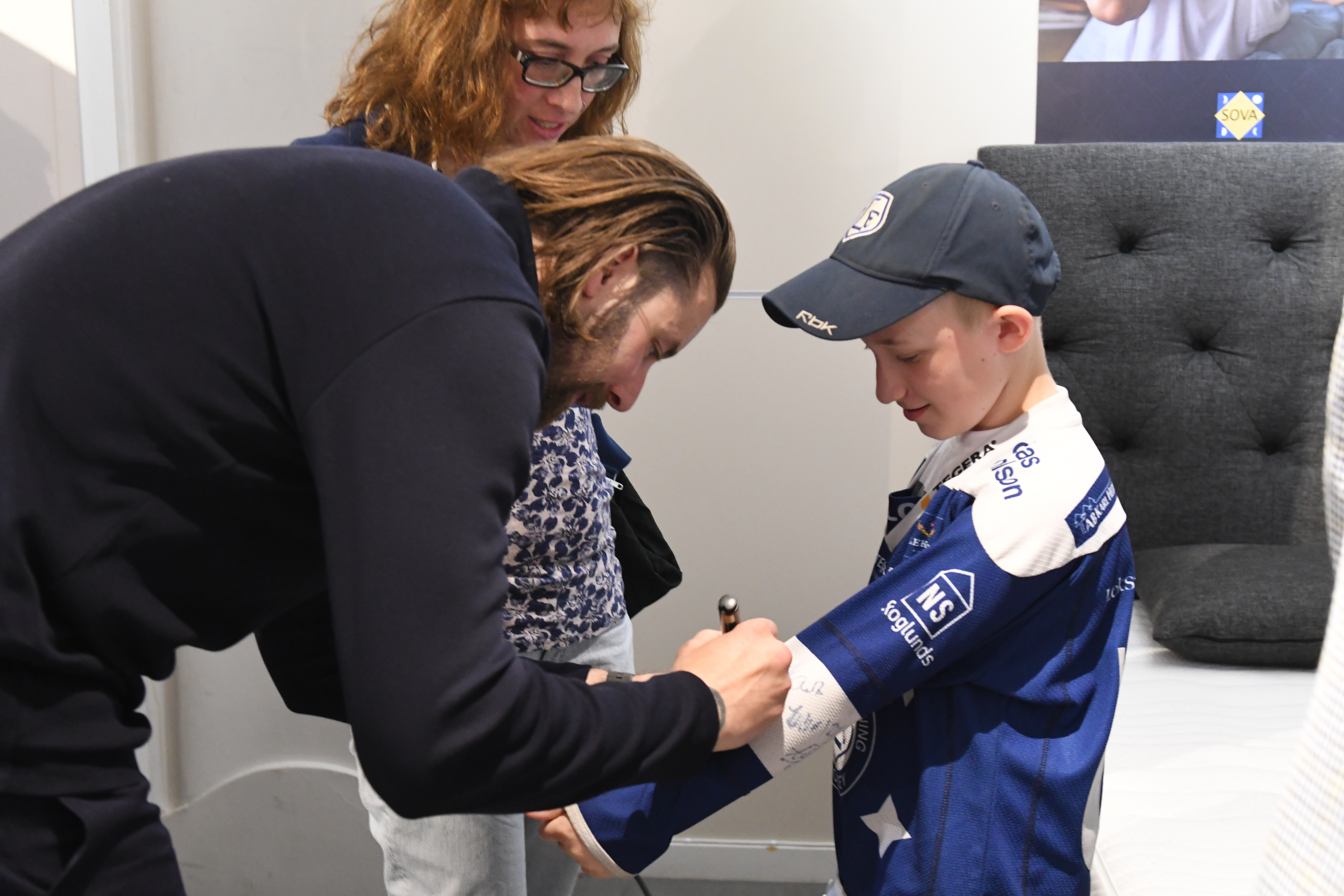 Leksands IF on Tour 2019 på besök i Stockholm. Mattias Karlsson signerar en tröja till en supporter.